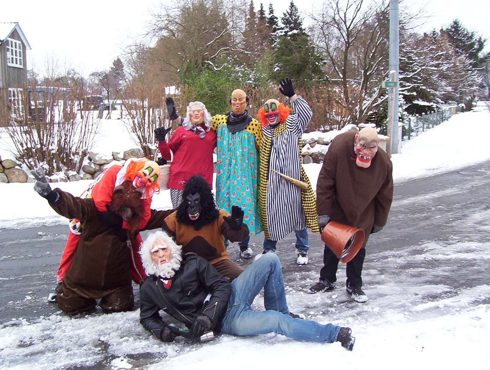 Faslamsumzug (Schnorren) 2007